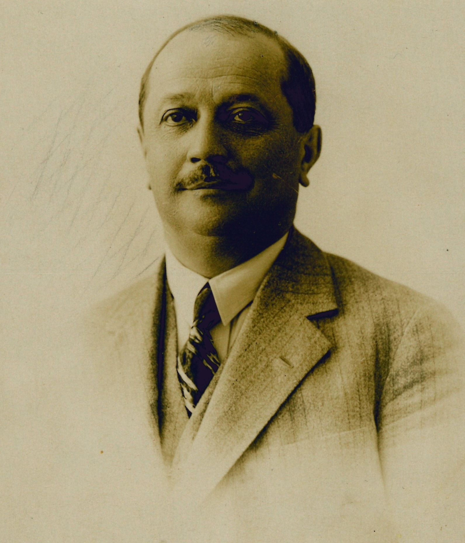 Sezai Selek portre